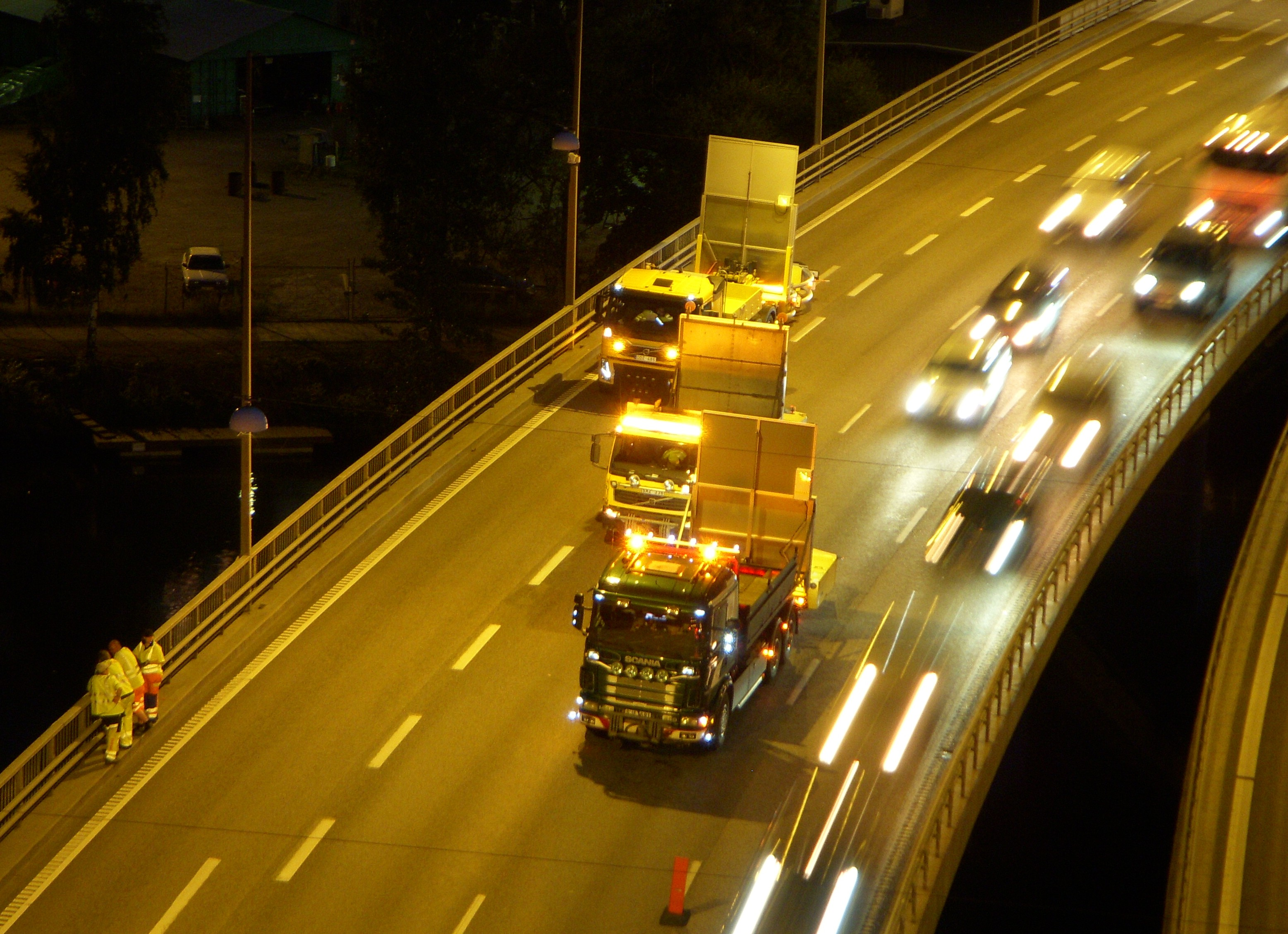 Nattarbeten på Essingeleden